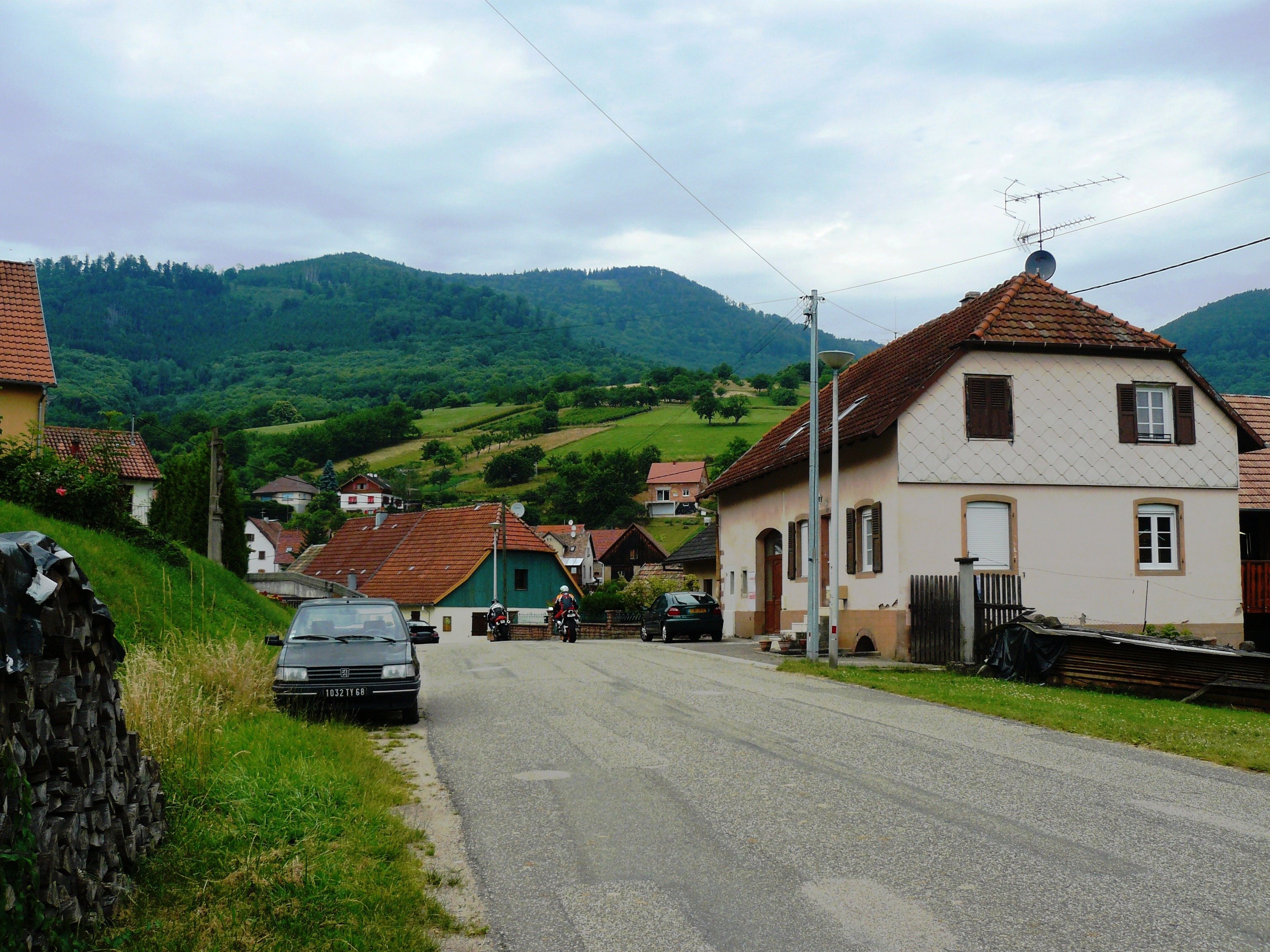 Breitenbach vers la sortie nord du village